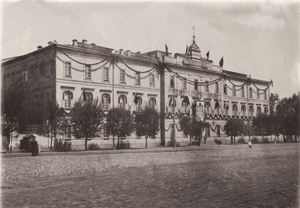 Вид на мужскую гимназию, со стороны горного училища, конец 1860х-начало 1870х